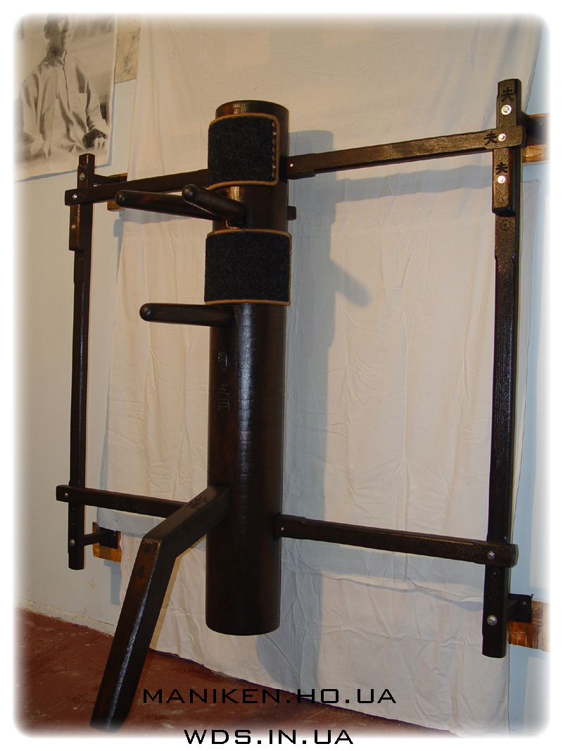 Деревянный манекен Вин Чун Кунг Фу